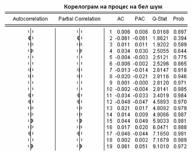 Корелограм на процесот на бел шум